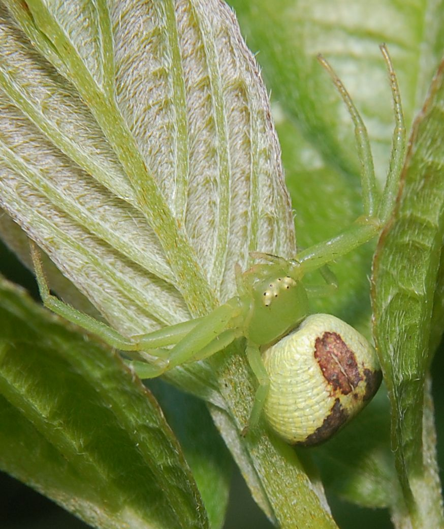 Ebrechtella tricuspidata, female (syn. Misumenops tricuspidatus). Tiefwerder, Spandau, Berlin.